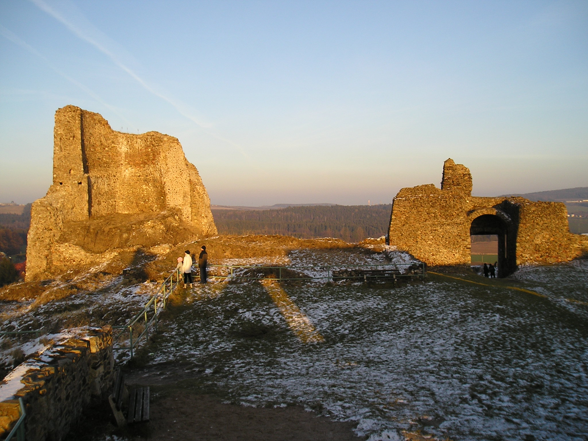 Lichnice v lednu